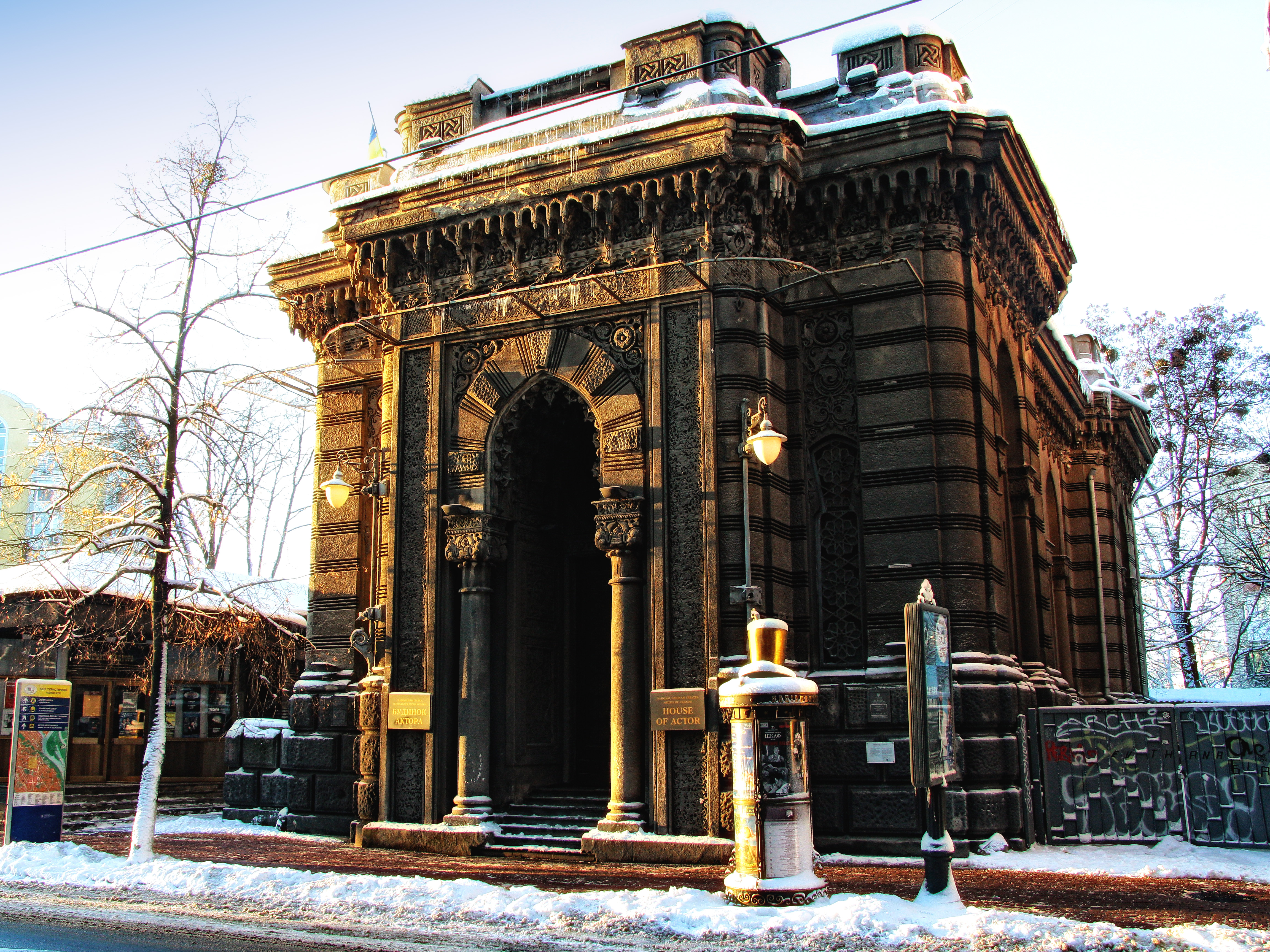 Кенаса караїмська, Київ, Ярославів Вал вул., 7